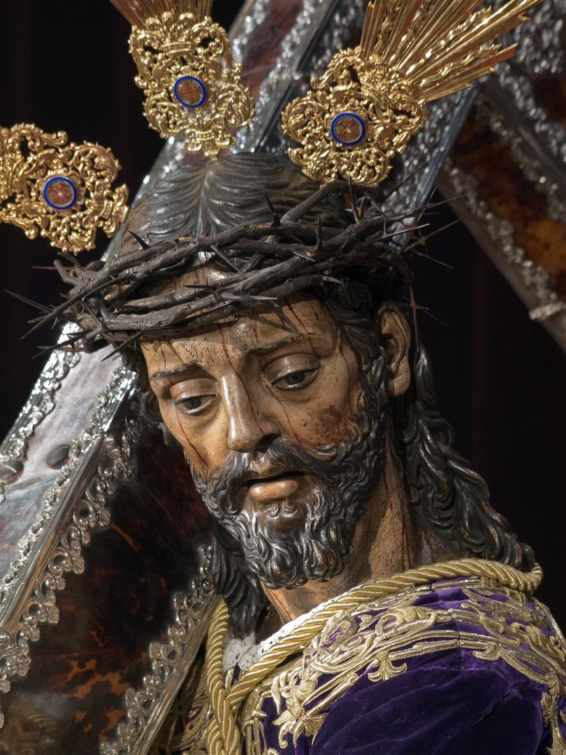 Bello rostro de Jesús Nazareno. Serenidad y aceptación del martirio.